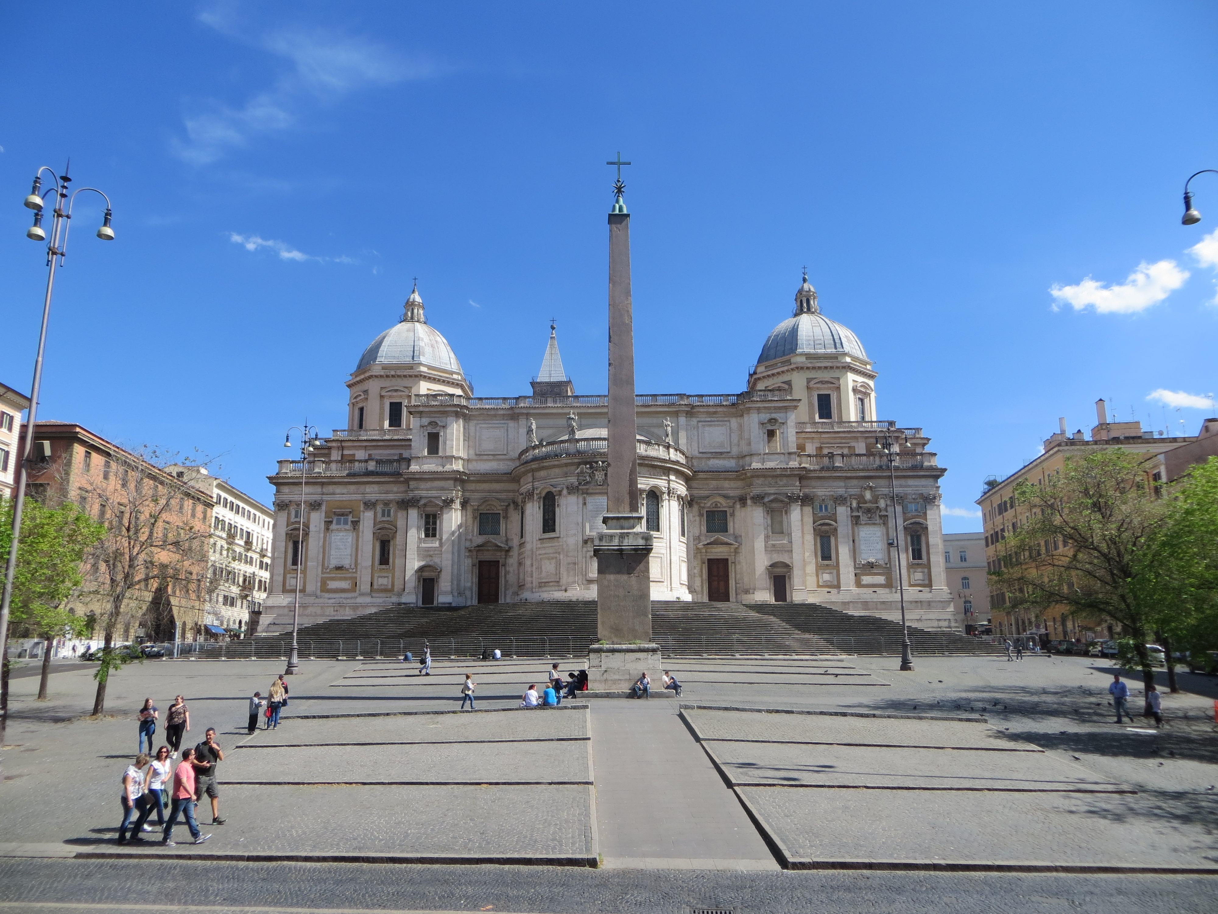 Rome